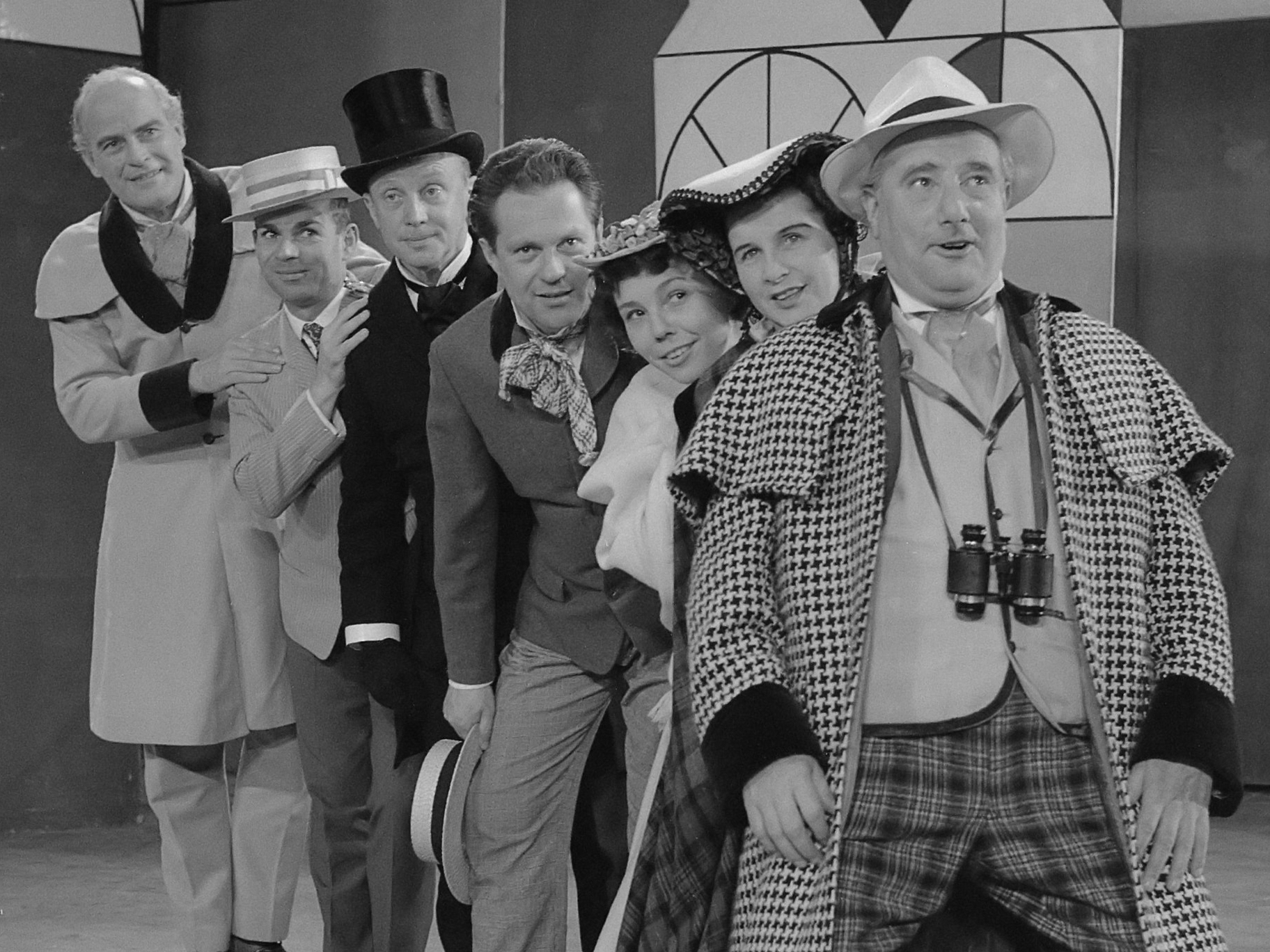 Televisiespel "Meneer Perrichon gaat op reis" 14 april 1959